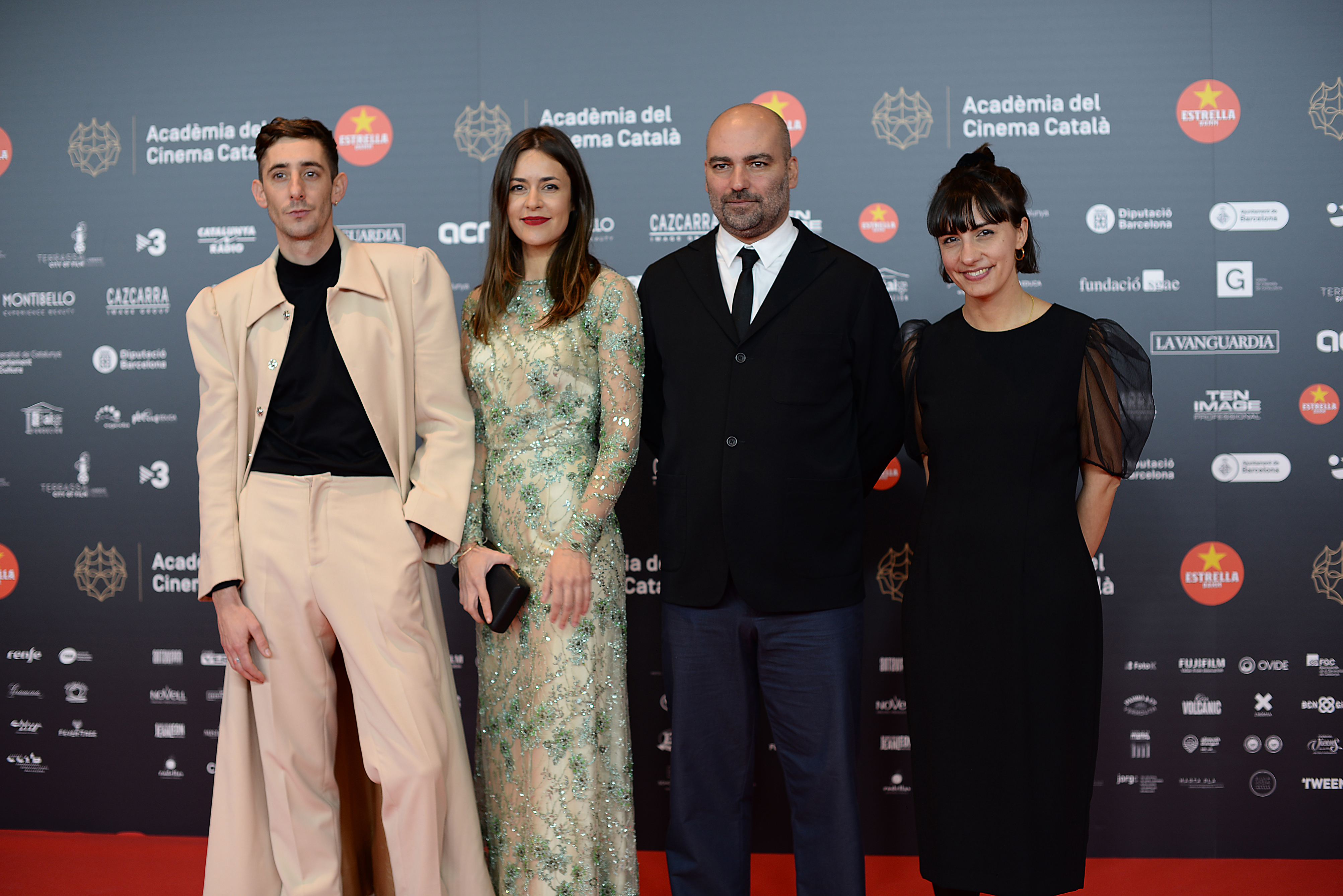 Enric Auquer, actor; Maika Makovski, cantant; Oriol Maymó, director de producció, i Vinyet Escobar, dissenyadora de vestuari (Quien a hierro mata), XII Premis Gaudí (2020)